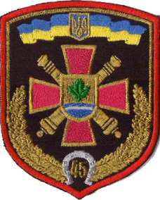 Нарукавний знак, 45 окрема артилерійська бригада